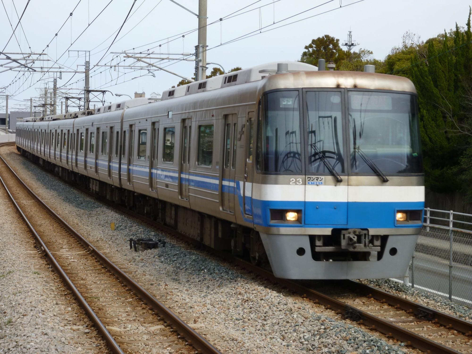 2014年3月4日、JR筑肥線下山門にて撮影。